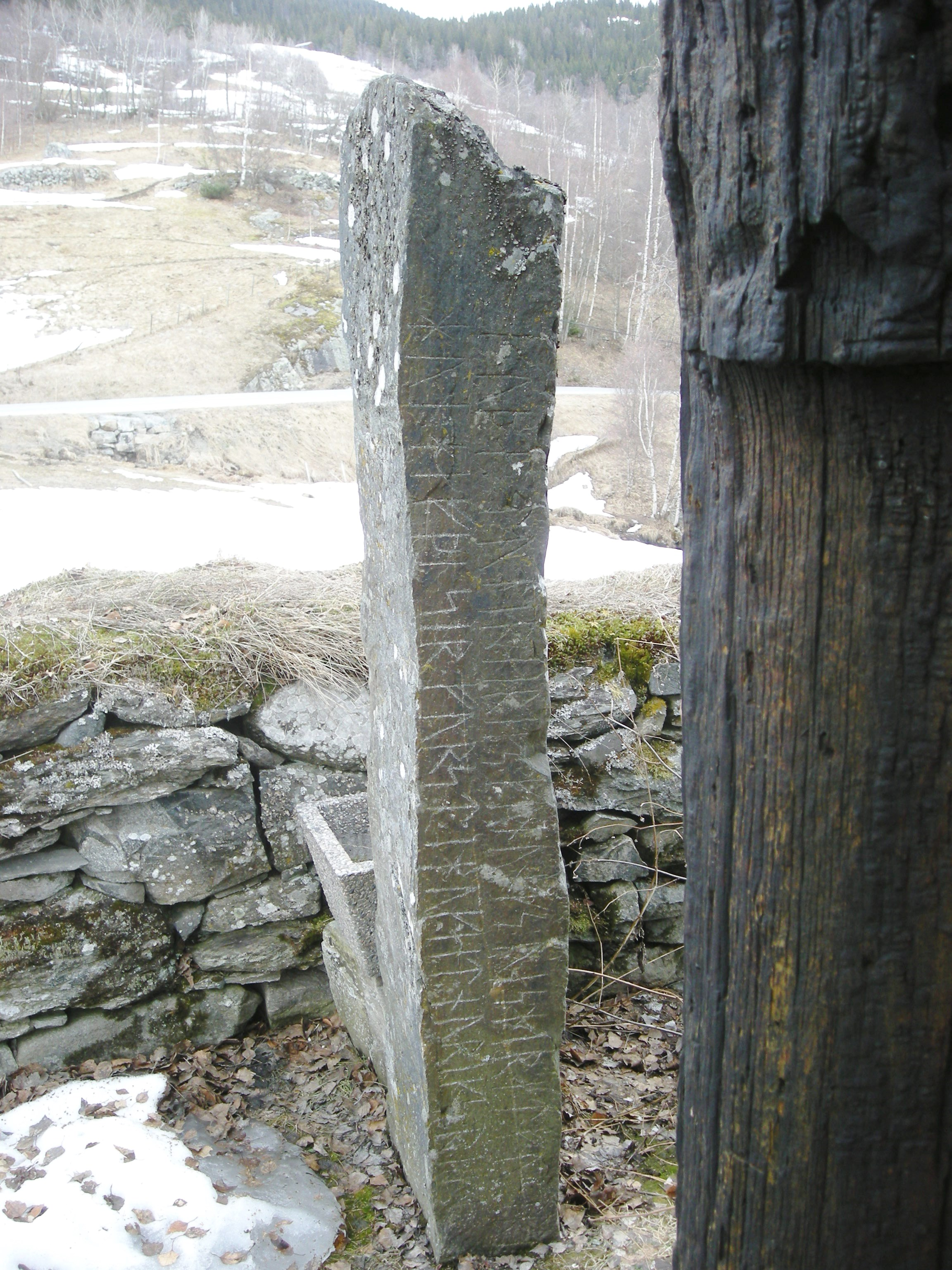 Runestein ved inngangen til kirkegården ved Høre stavkirke